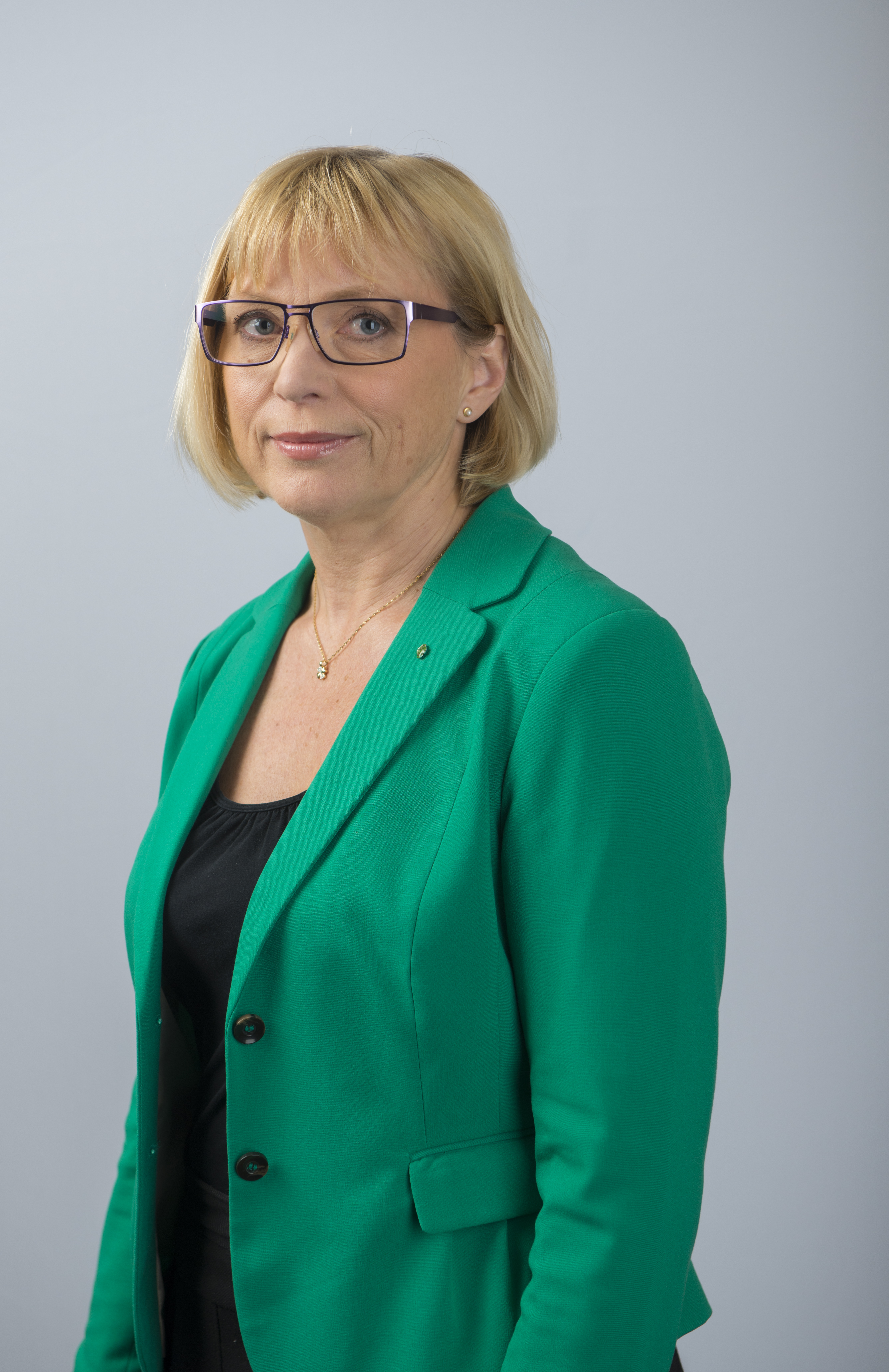 Patrick Trägårdh